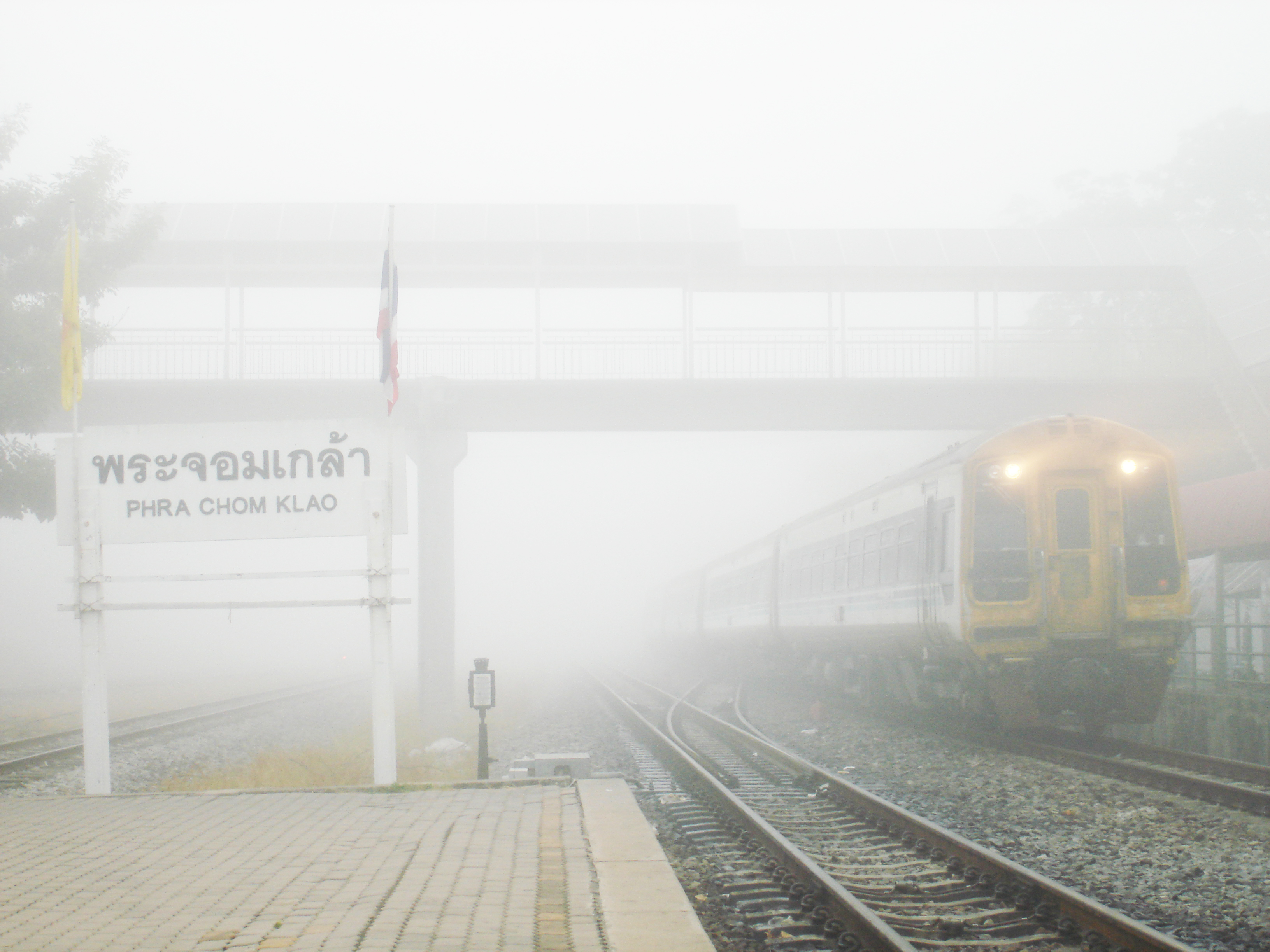 ป้ายหยุดรถไฟพระจอมเกล้า ถ่ายเมื่อวันที่ 13 มกราคม 2551 เวลา 7:39 น. ภาพถูกถ่ายโดย นายธนันท์ บูรณพงศ์ อนุญาตให้นำภาพไปเผยแพร่ได้ตามสัญญาอนุญาตครีเอทีฟคอมมอนส์ CC-BY-SA